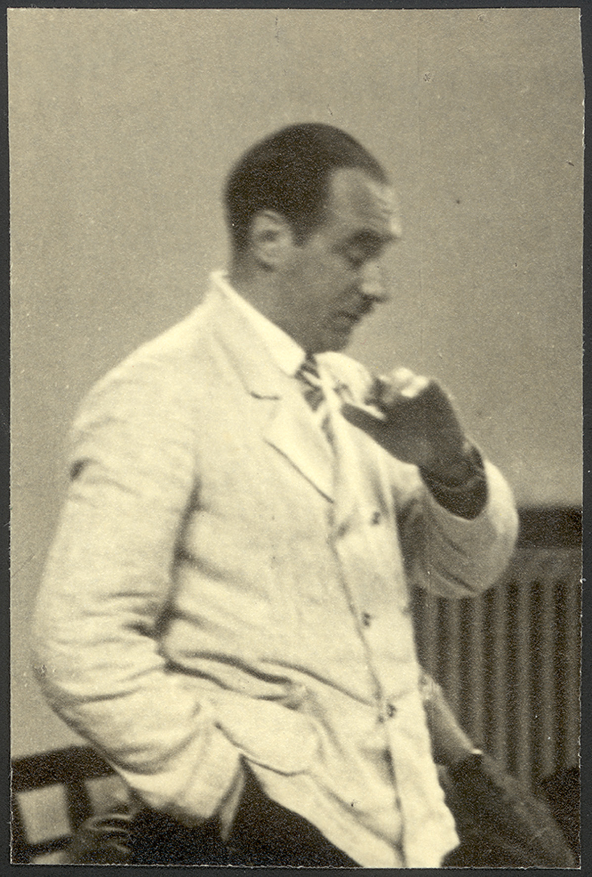 Held, Heinrich Pfarrer Essen - Rüttenscheid, Freie Evangelische Synode Barmen, 3. und 4. Januar 1934; Abgabe: Heinz Joachim Held 05/2006 Bestand: AEKR Düsseldorf 8SL 046 (Bildarchiv), 80018_02